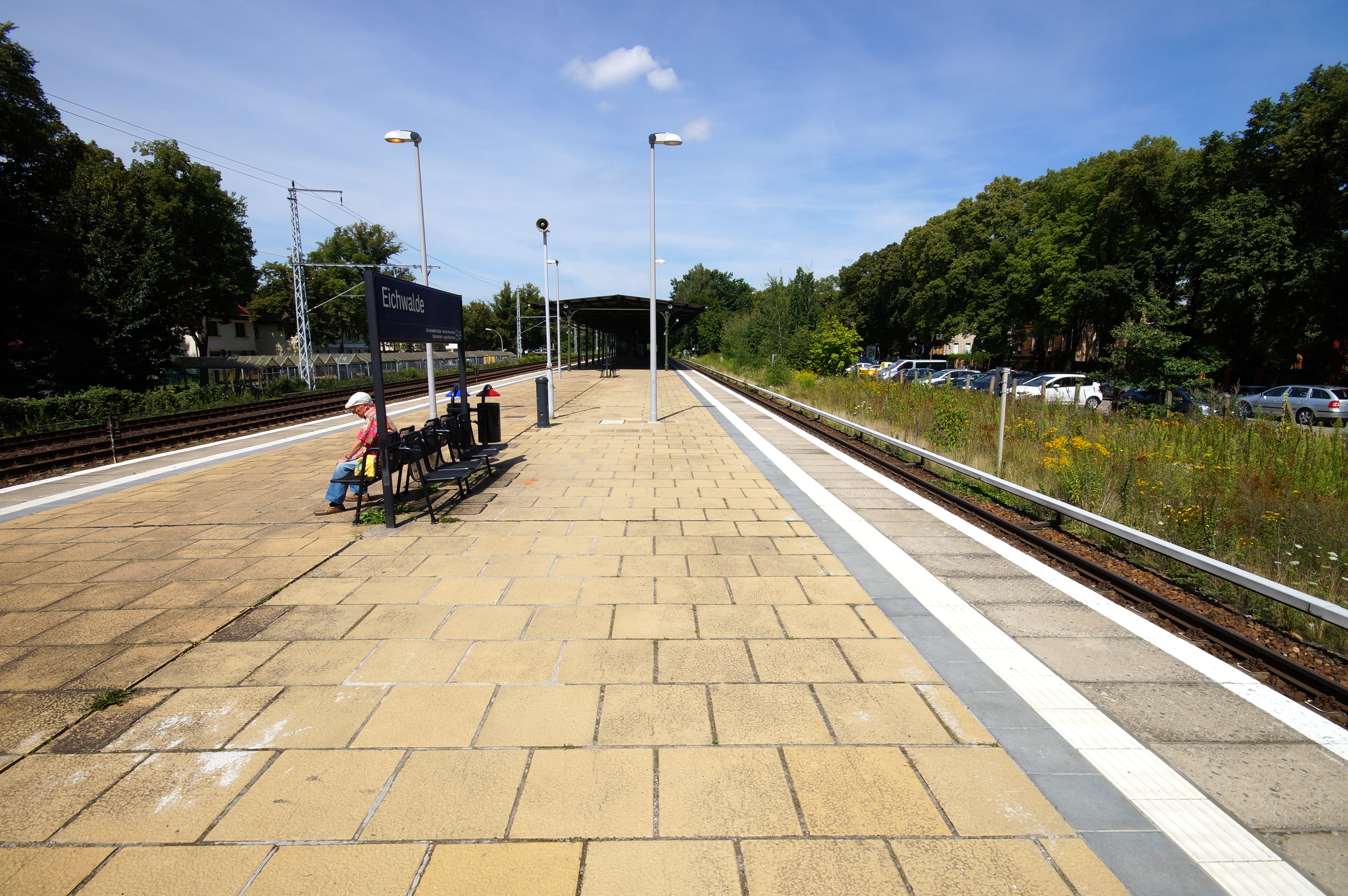 Die Bahnsteige des Eichwalder Bahnhofs